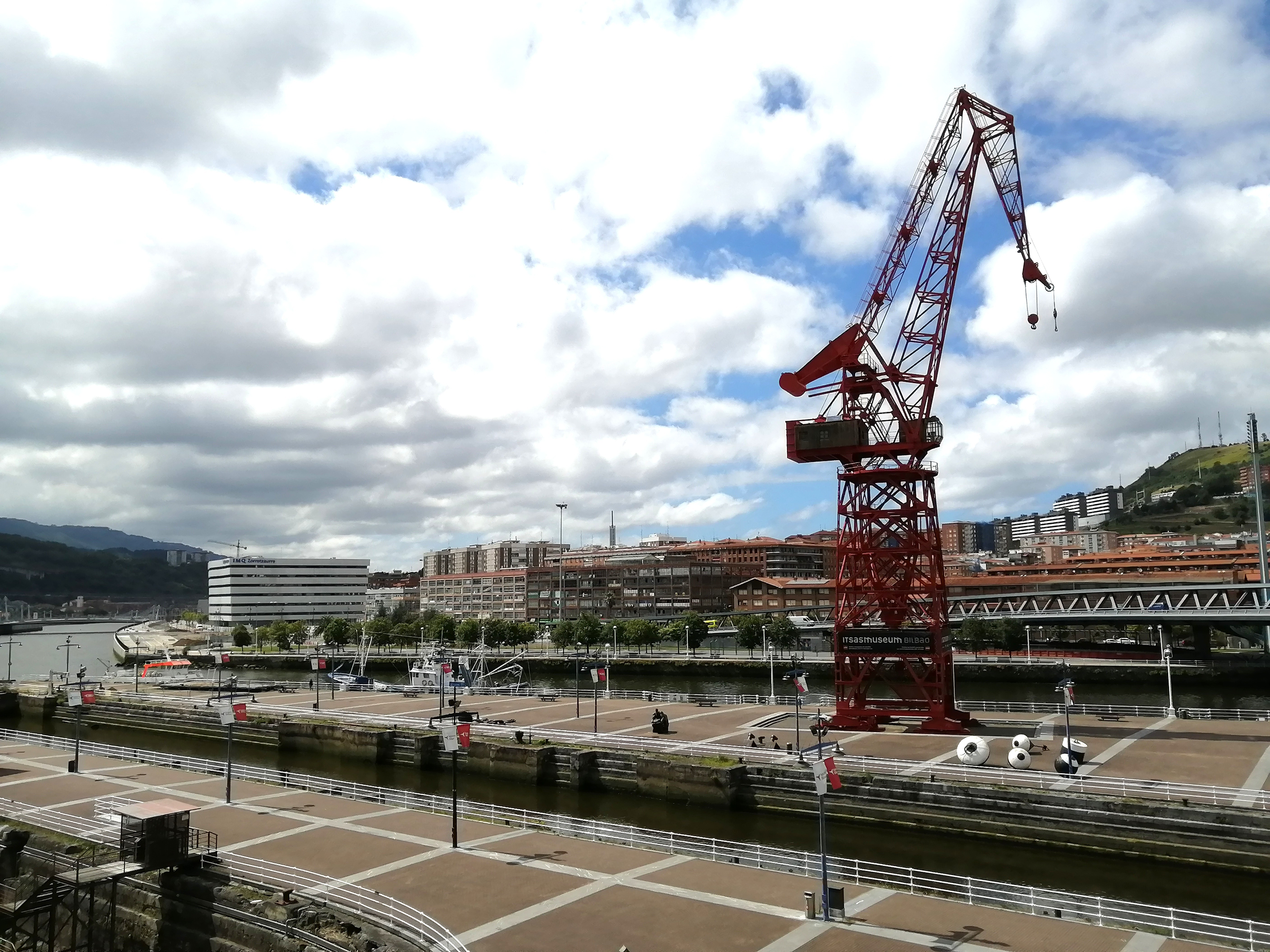 Itsas museoko garabia, Bilbon